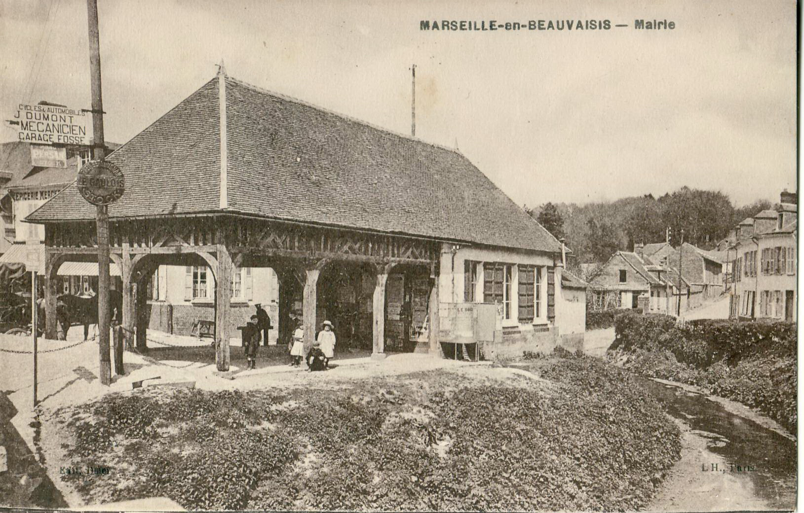 Carte postale ancienne éditée par l'H MARSEILLE-EN-BEAUVAISIS : Mairie (La halle du XVIe siècle qui abrite, désormais, l'Office du tourisme de la Picardie verte et le Petit Thérain)